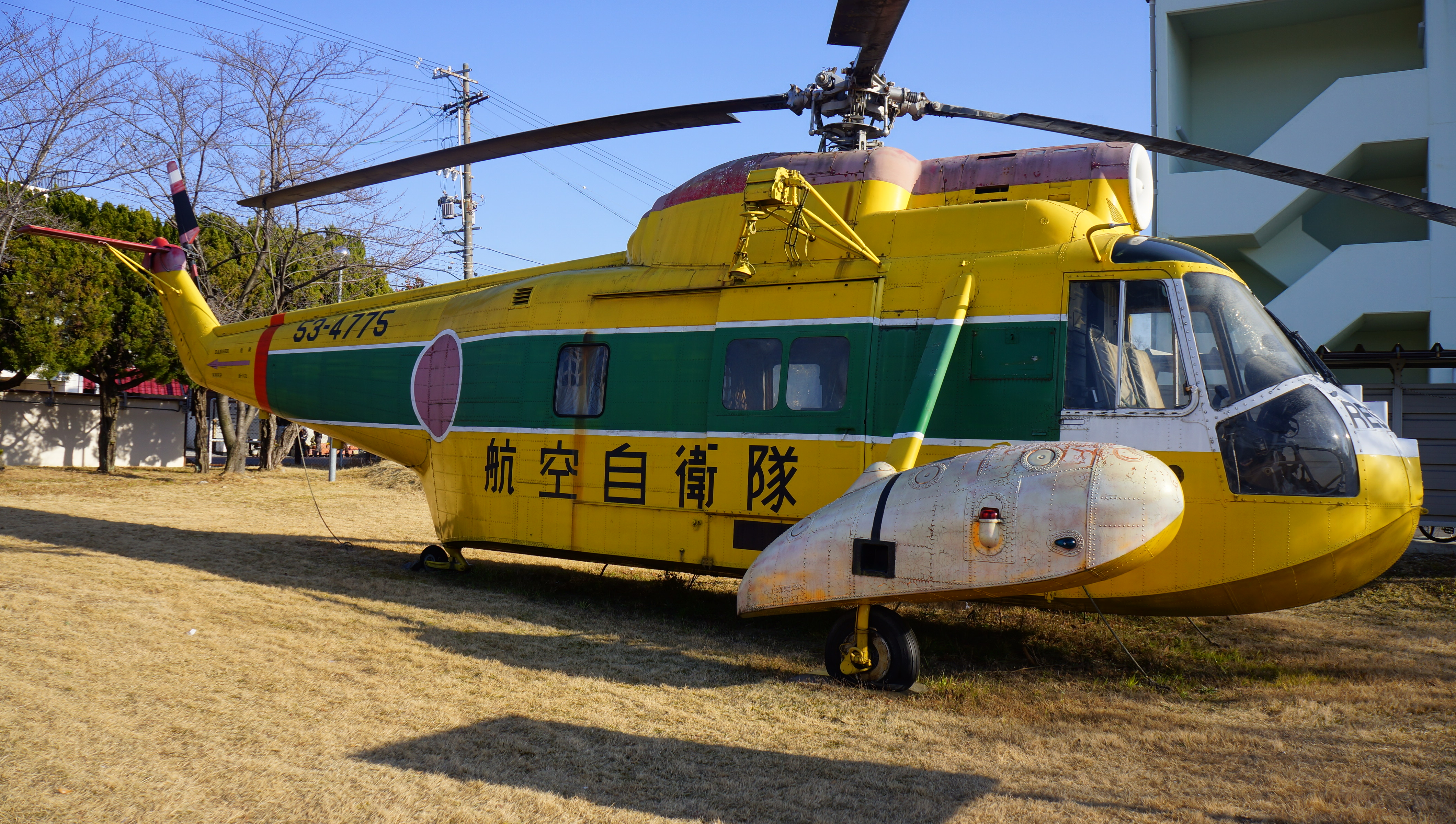 航空自衛隊 S-62J救難ヘリコプター 53-4775号機。 14年2月23日 航空自衛隊小牧基地にて。